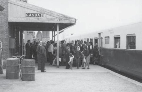 Ultimo tren del Midland, por Casbas